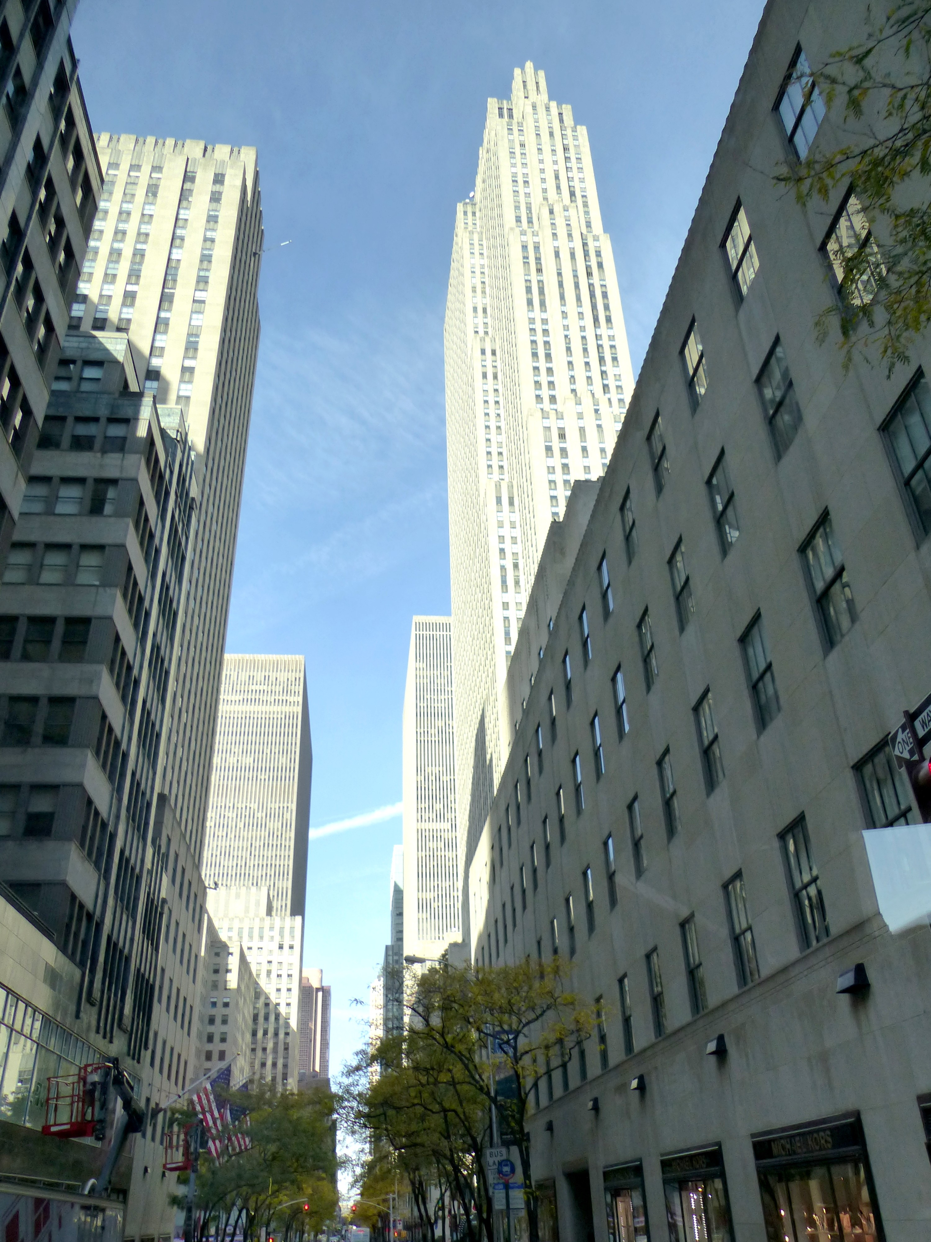 NYC - Rockefeller Center